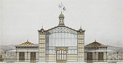 Gare du Champ de Mars, Paris. Le bâtiment a été remonté à Asnières-sur-Seine, où il sert de gare électrique de Bois-Colombes de 1924 à 1936.